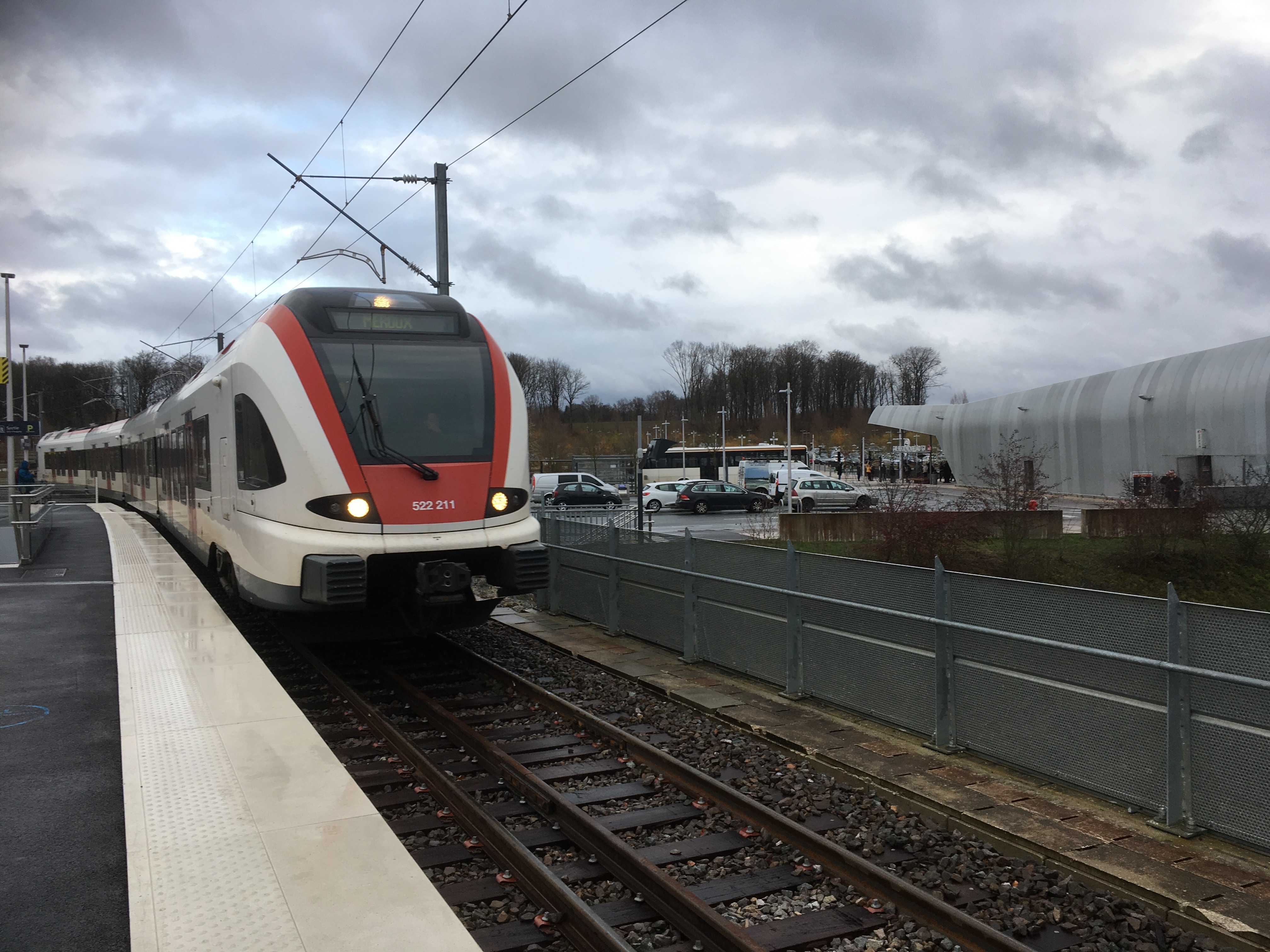 Halte TER de Meroux surplombant les quais de la gare "Belfort-Montbéliard TGV". Photo réalisée lors de la journée "Portes ouvertes" ayant précédé la mise en service régulière de la ligne "Delle - Belfort" le dimanche 9 décembre 2018.